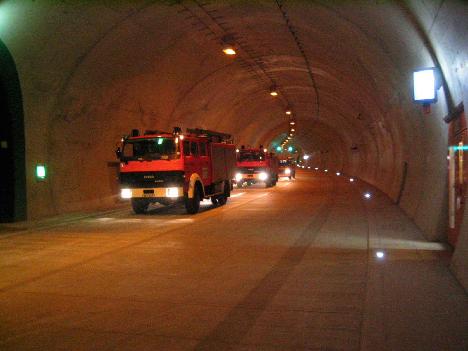 Burgholztunnel in Wuppertal. Südröhre. Fahrtrichtung Bergauf. Sonnborn - Cronenberg (Foto: 3 Wochen vor Eröffnung). Im Bild der Löschzug der Freiwilligen Feuerwehr Hahnerberg bei einer Besichtigung.